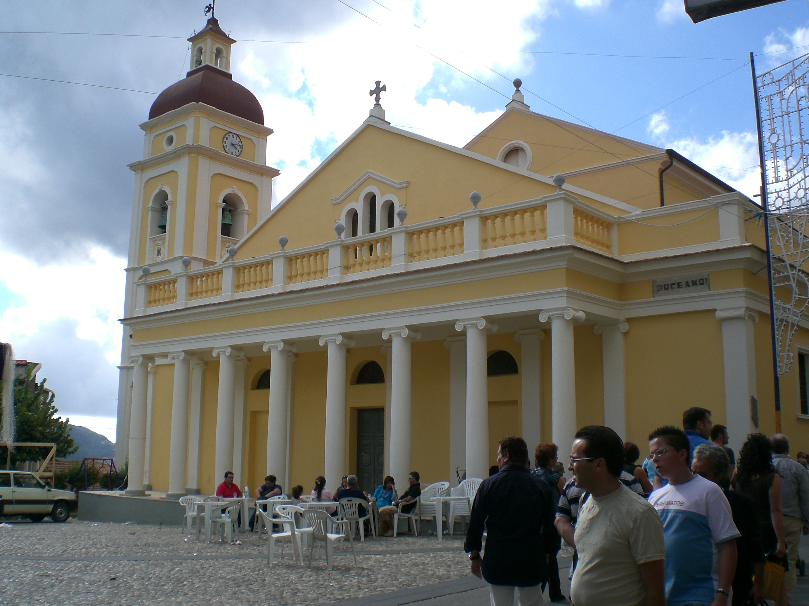 Una foto del retro della Chiesa della Madonna di Visora, in Conflenti